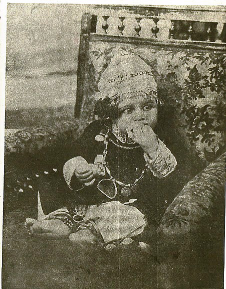 Bahadur Yar Jung aged 1